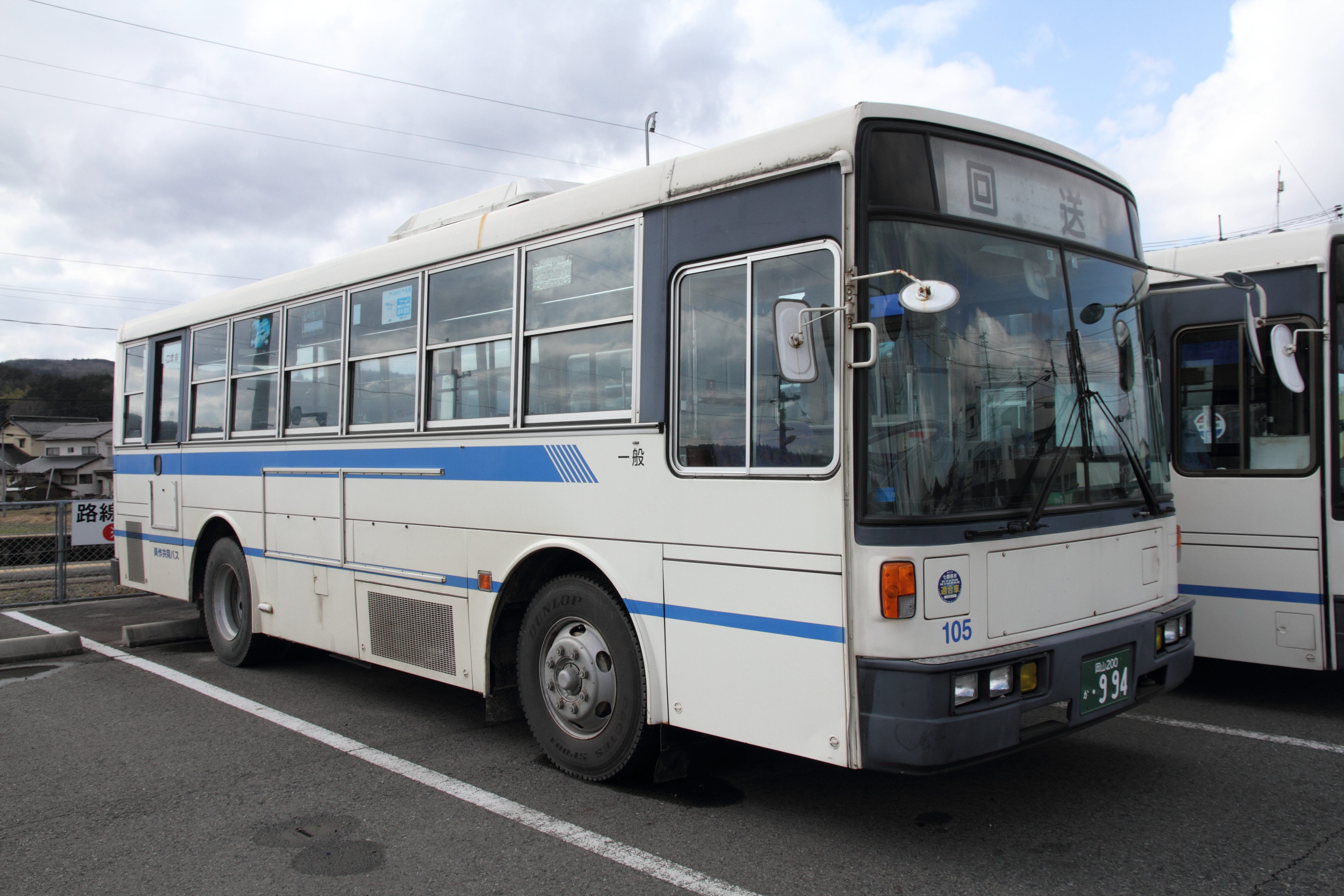 美作共同バス 岡山200か・994 勝間田駅にて Canon EOS 7D